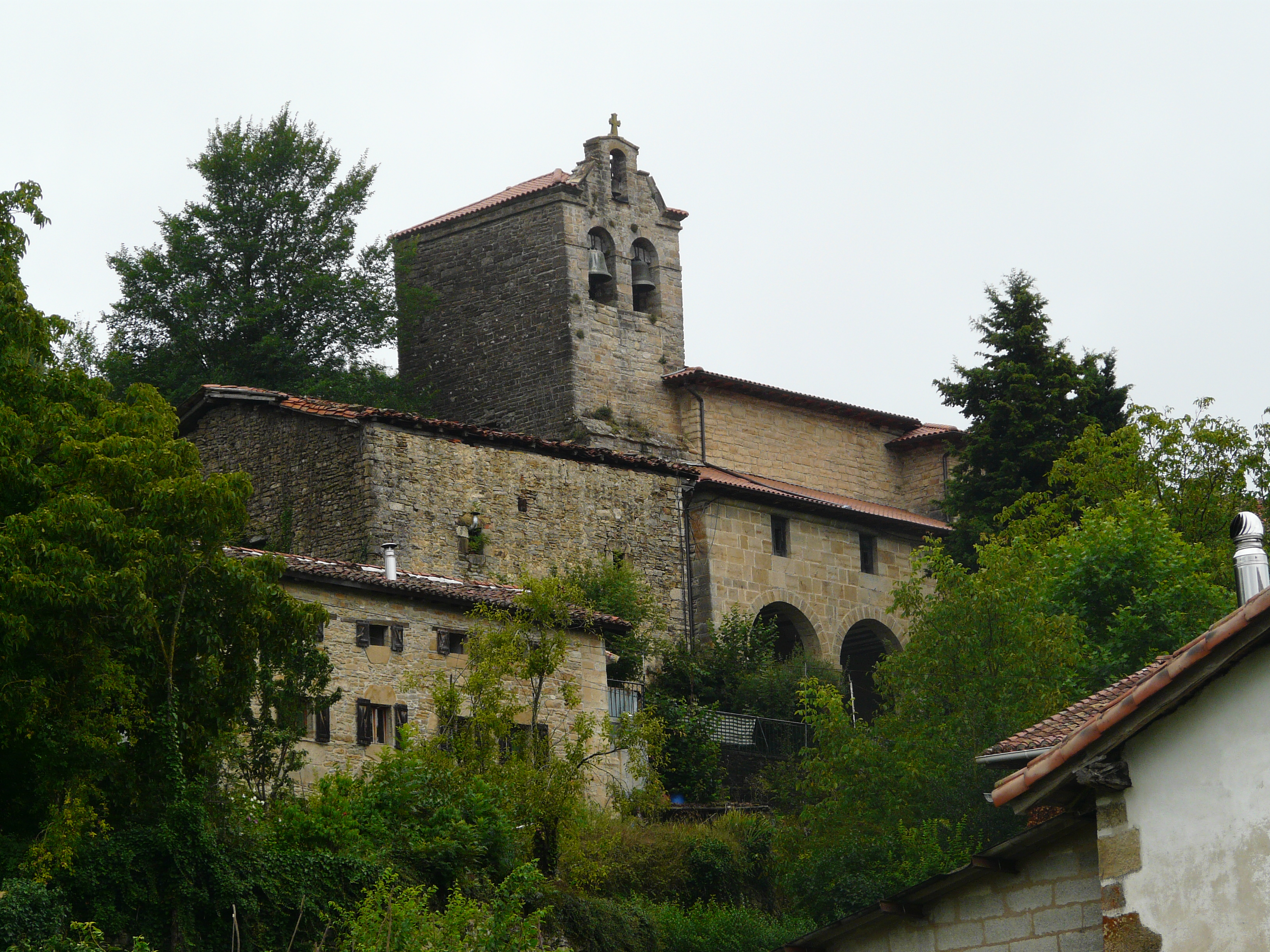 Oskotz